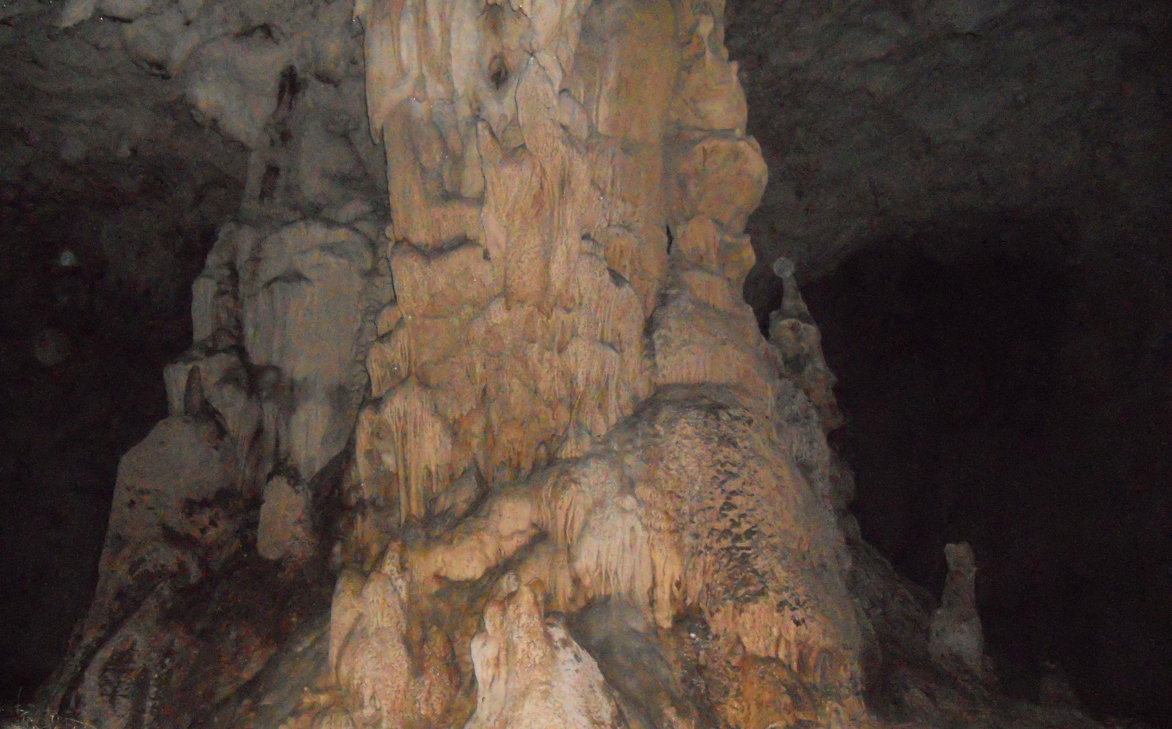 Shpella e Pëllumbasit